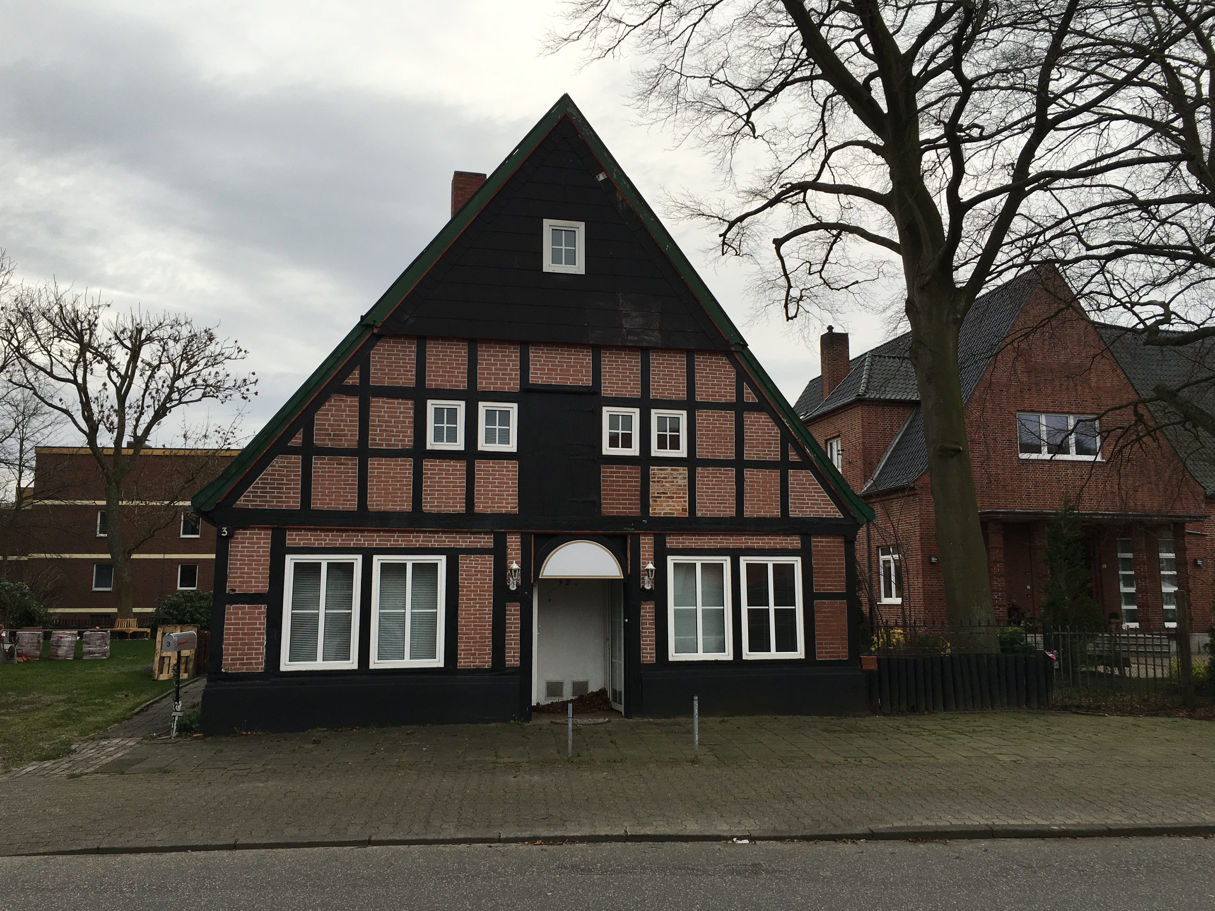 Oold Huus bi de Kark in Döös (Cuxhoben)